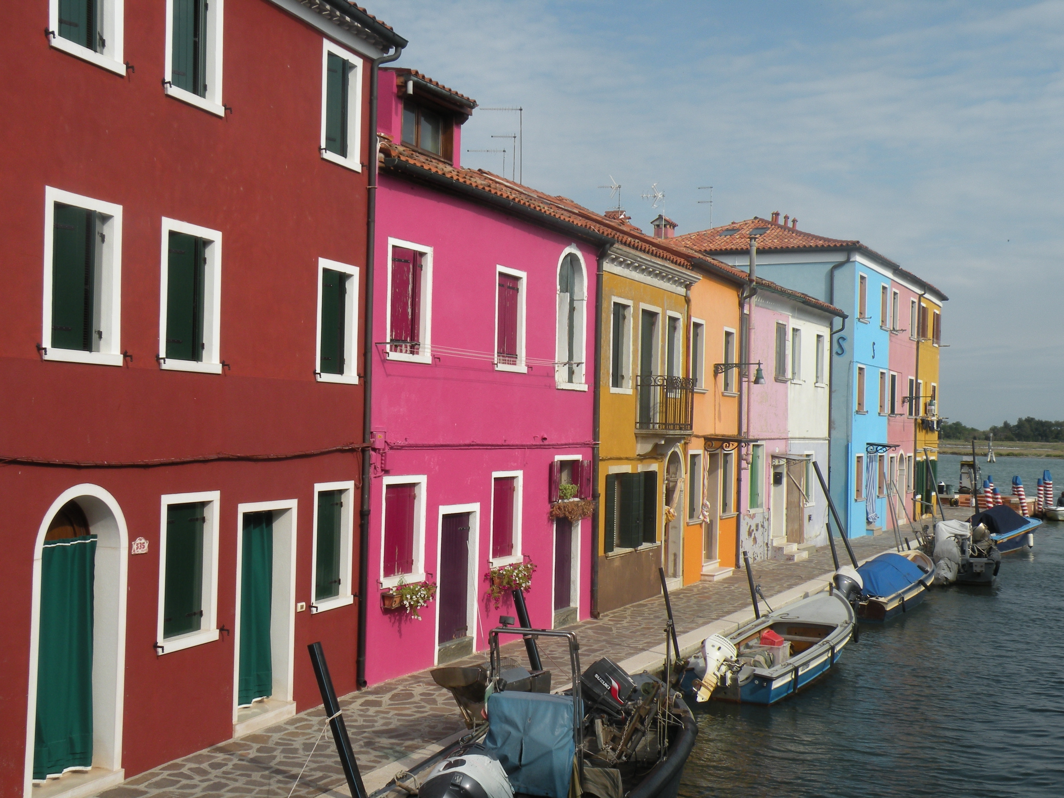 Fondamenta Pontinello Sinistra in Burano, Italy